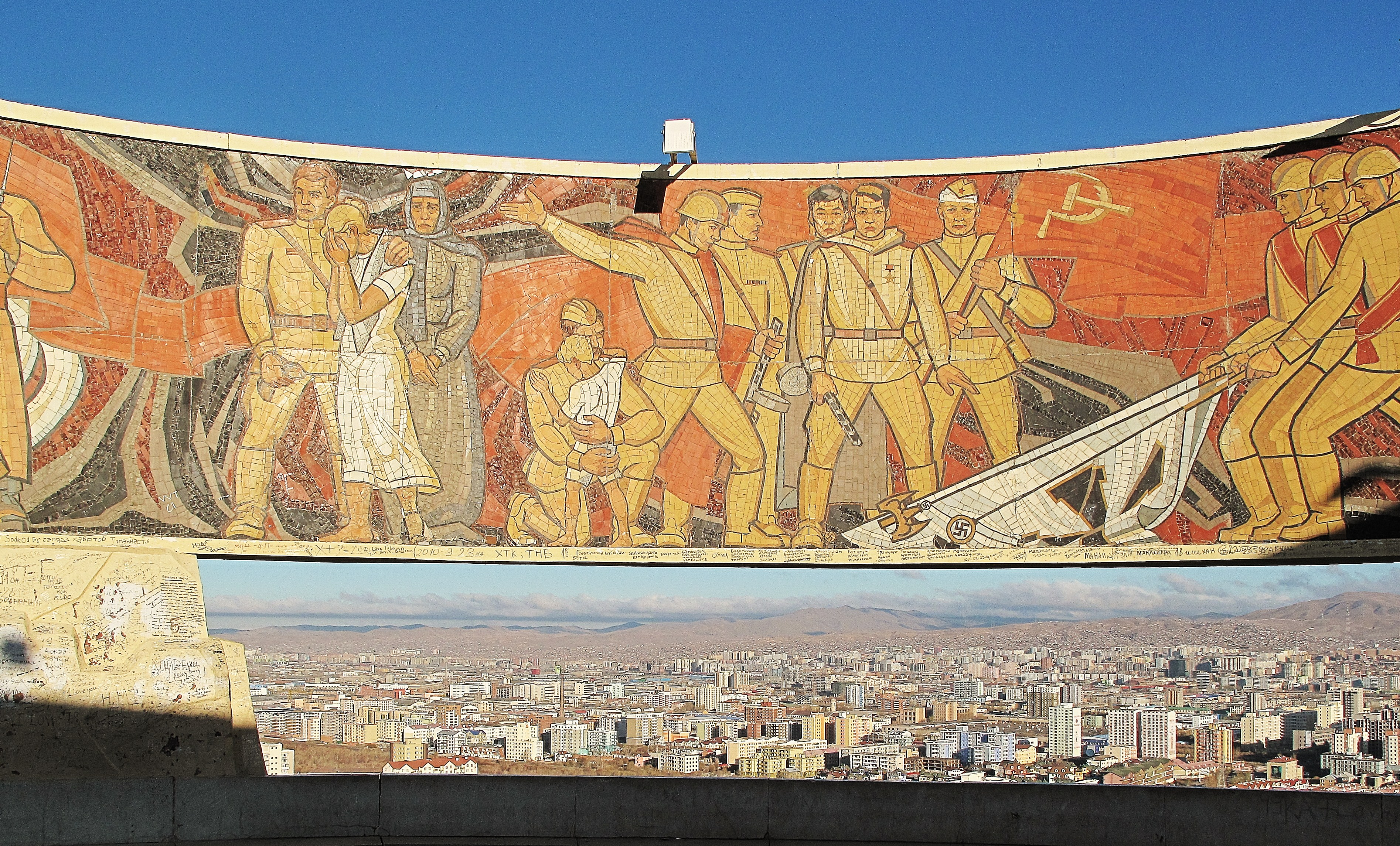 World War II in Ulaanbaatar